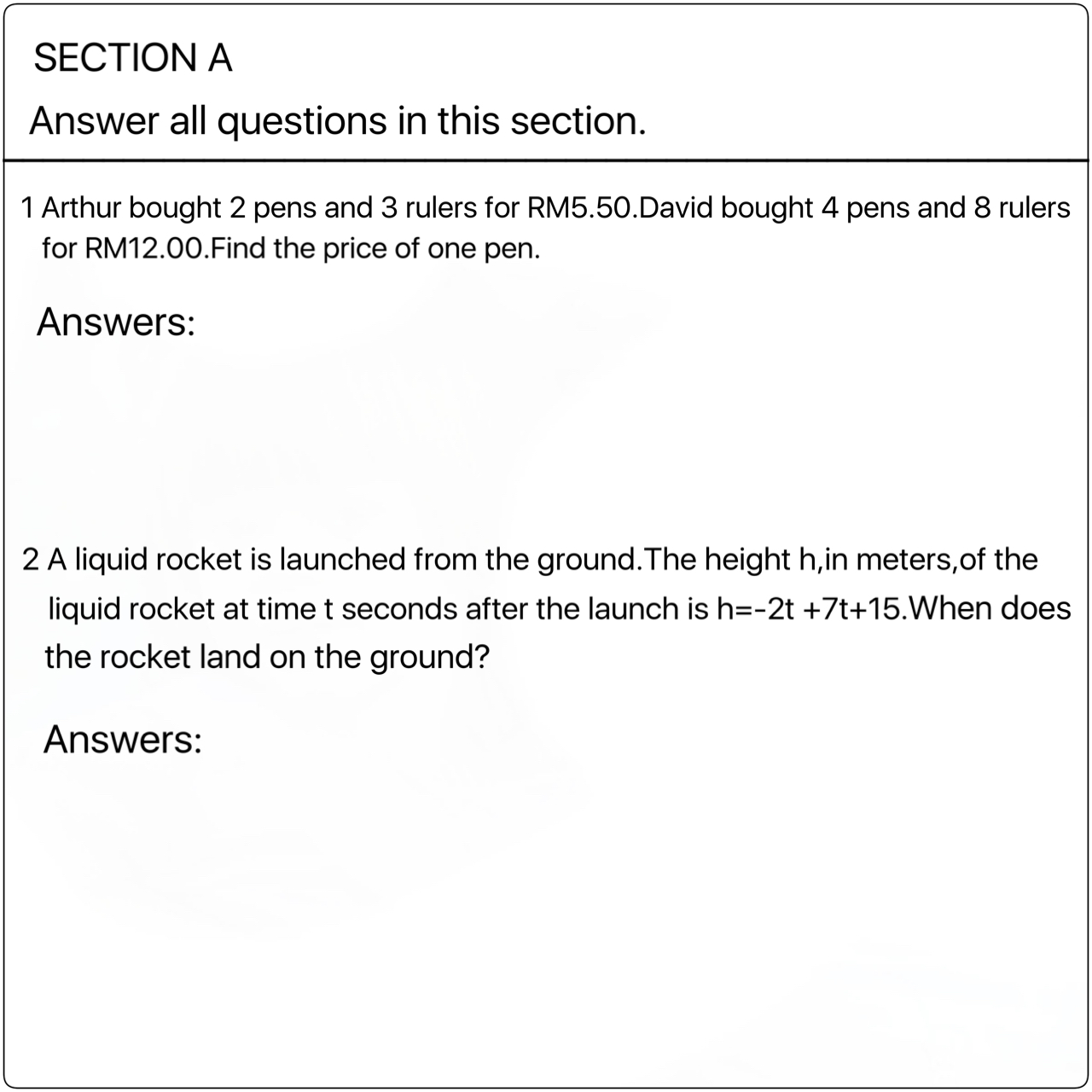 中文（中国大陆）: 运算型数学题